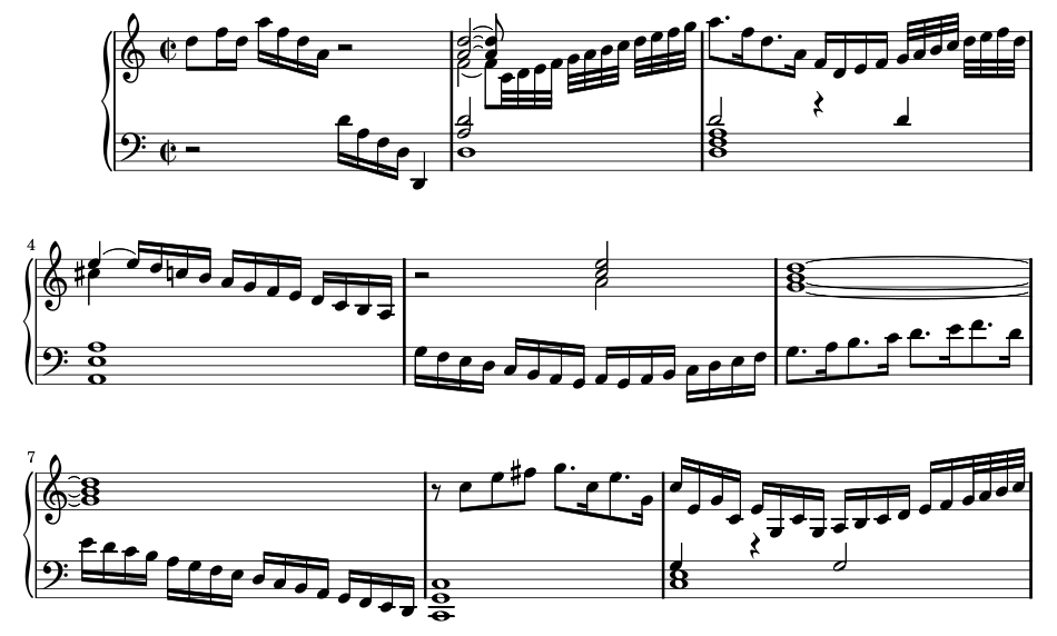 Premières mesures de la Toccata de Giovanni Pichi, incluse dans le Fitzwilliam Virginal Book, n° 95.